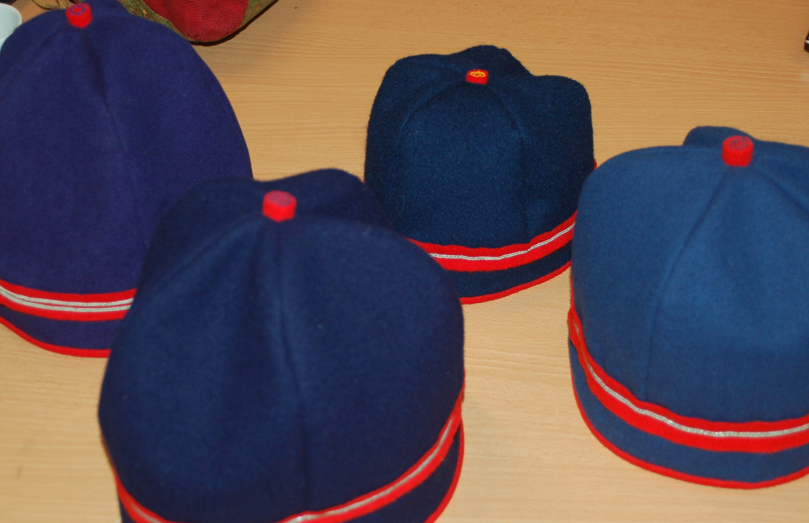 Lulesamisk kvinnelue